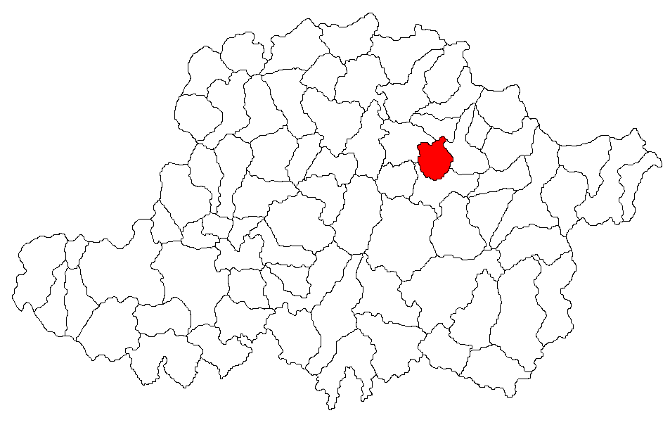 Categorie:Hărţi ale judeţului Arad